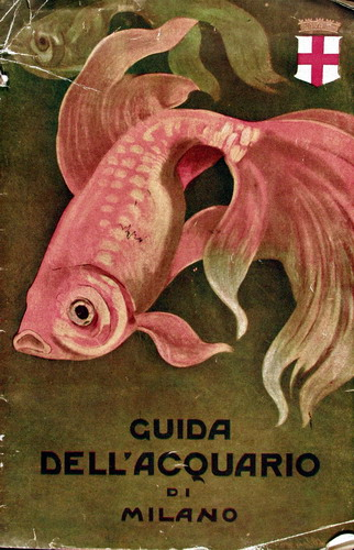 Mauro Mariani, Biblioteca Acquario, Copertina guida Acquario, GFDL, fatta da me